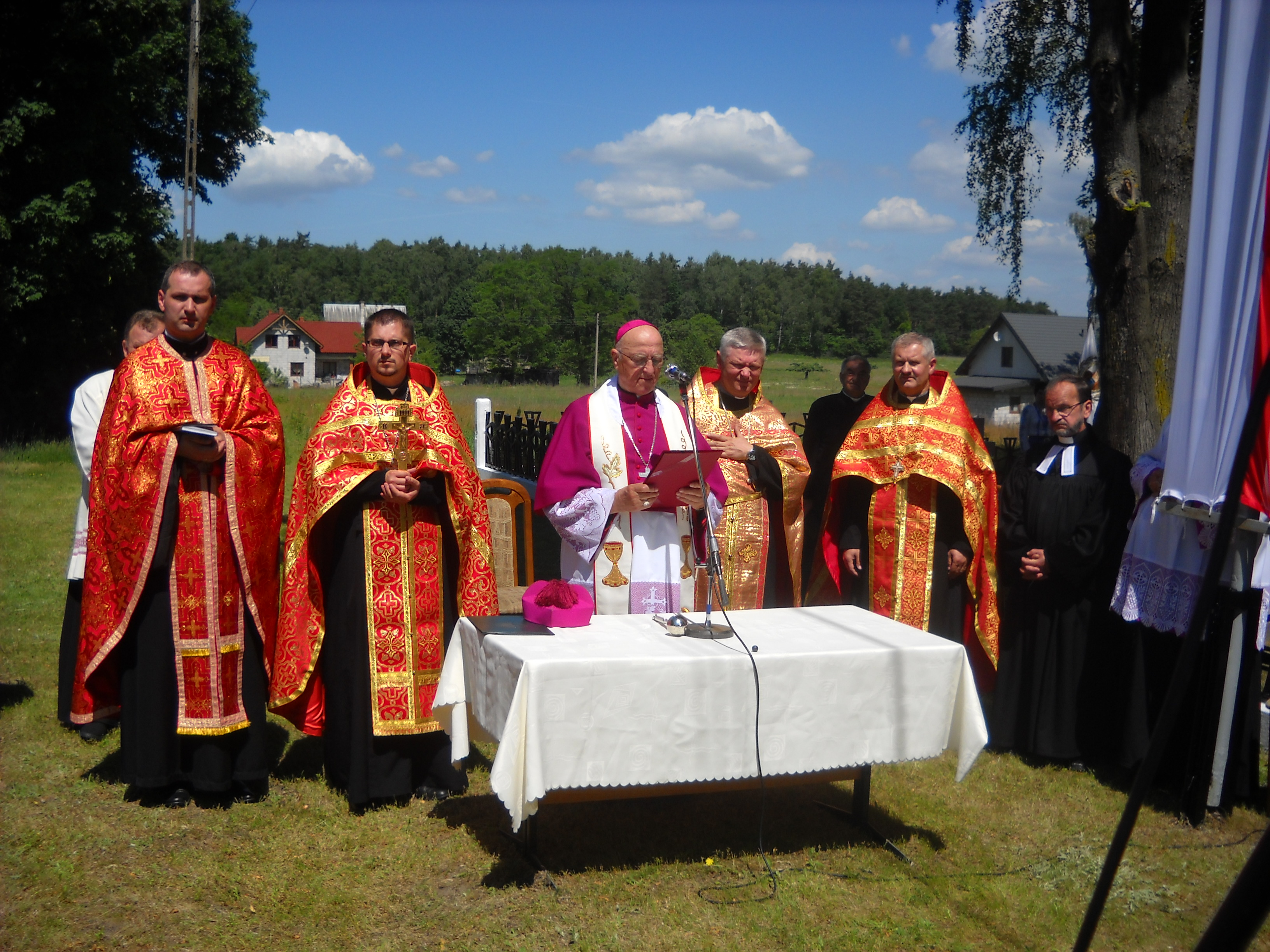 Modlitwa ekumeniczna na Ukraińskim Cmentarzu Wojskowym w Aleksandrowie Kujawskim. Od lewej duchowny Kościoła greckokatolickiego, ks. Daniel Popowicz, biskup senior diecezji włocławskiej Stanisław Dembowski, ks. Mikołaj Hajduczenia, ks. Jarosław Dmitruk, ks. Jerzy Molin